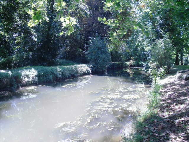 L'Orge à Sainte-Geneviève-des-Bois (Essonne, Île-de-France, France).